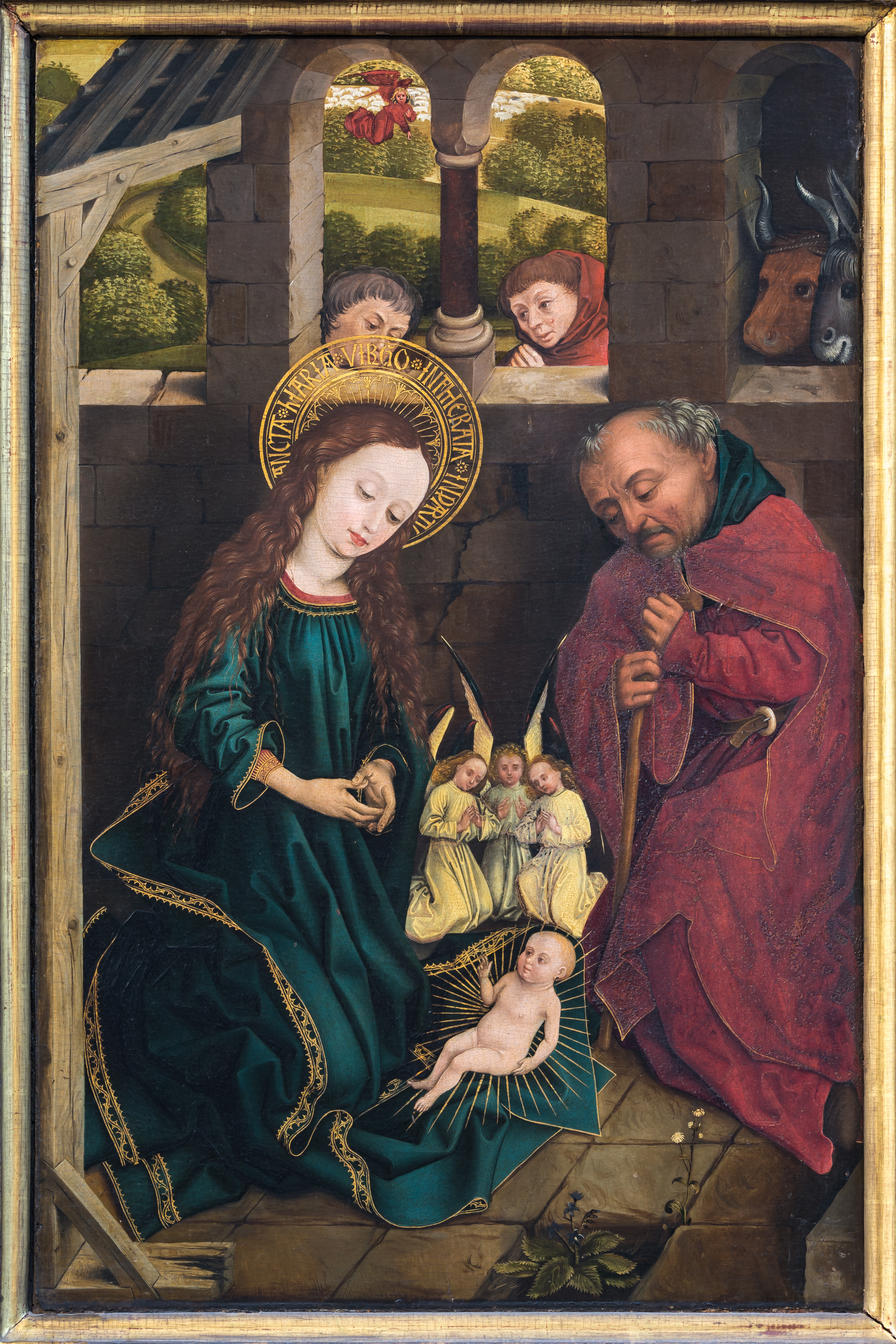 Altar of the Magi (Dreikönigsaltar)